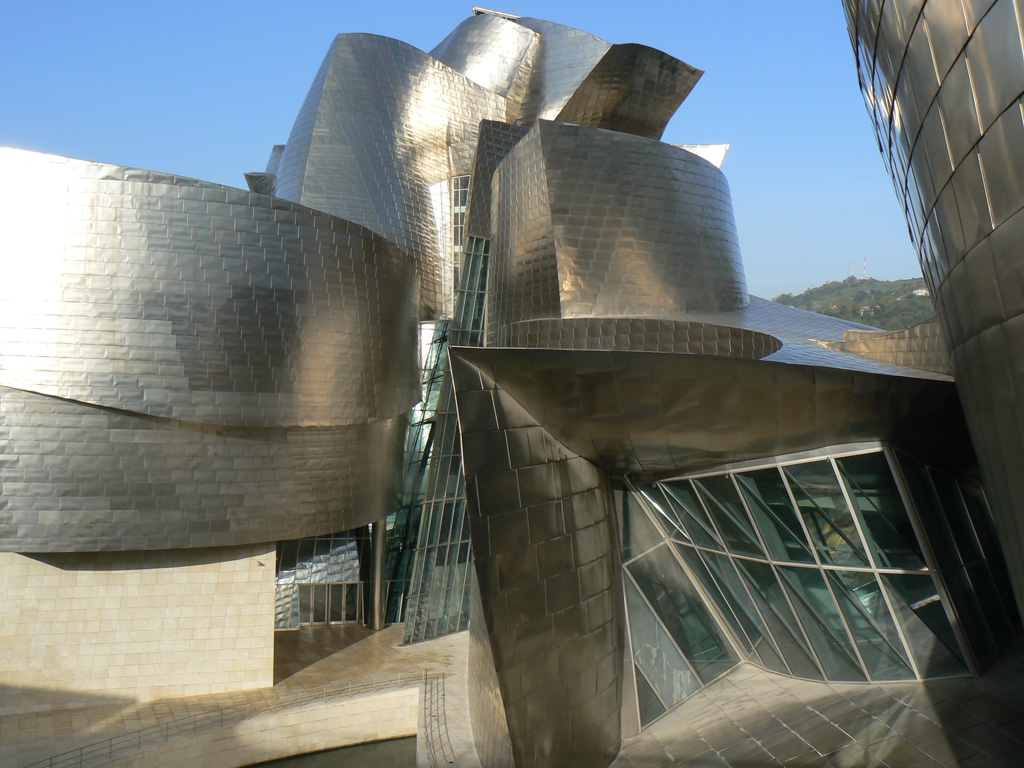 Ce musée créé à Bilbao par Frank O. Gerhy est une fleur de titane dans un écrin urbain...